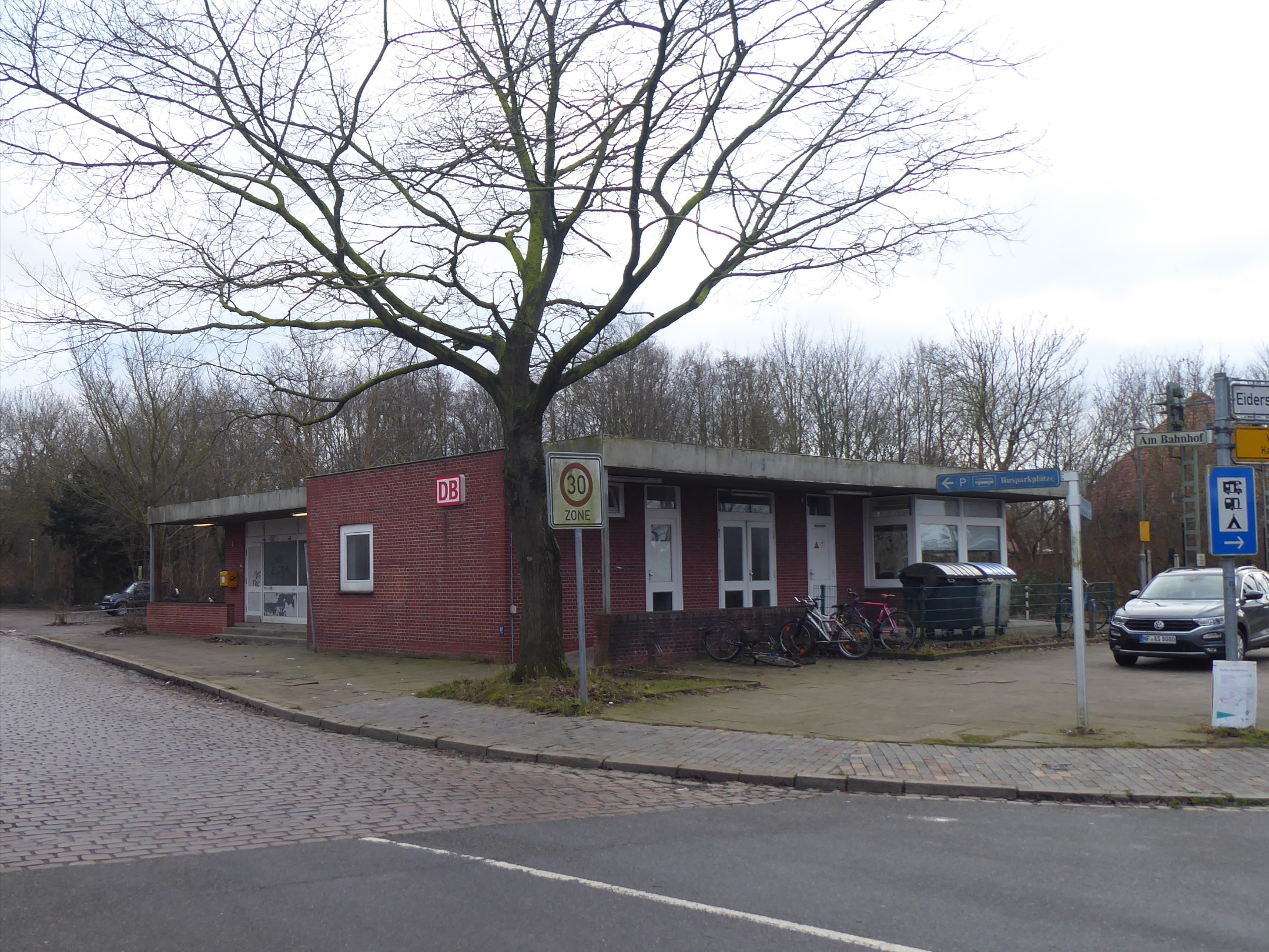 Bahnhof Tönning